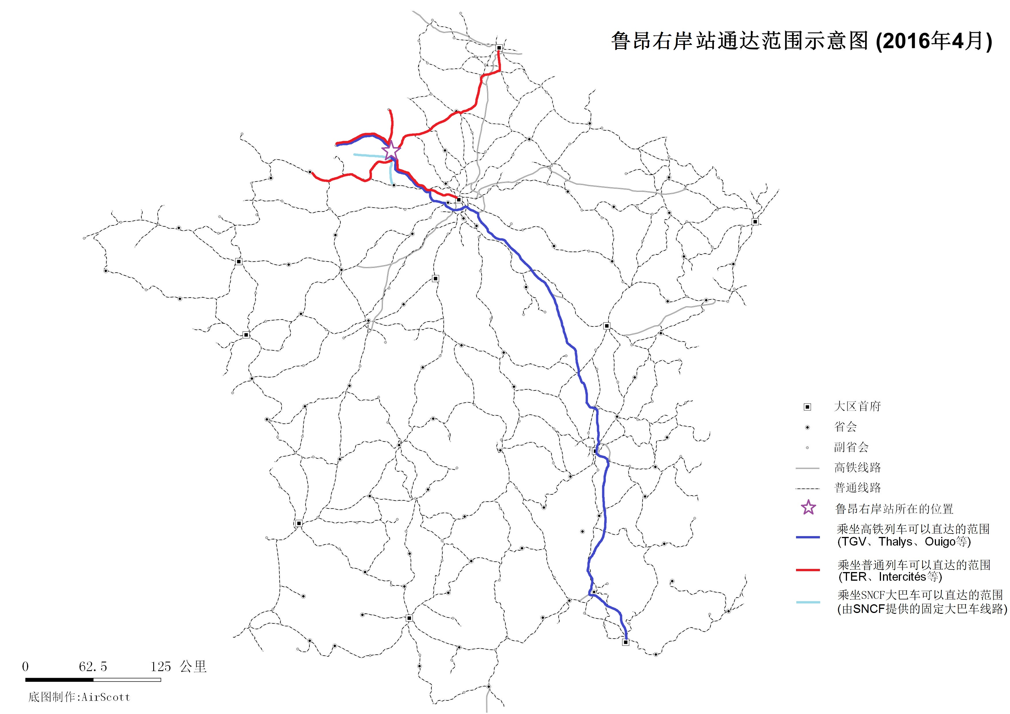 鲁昂右岸站（Gare de Rouen-Rive-Droite）通达范围示意图